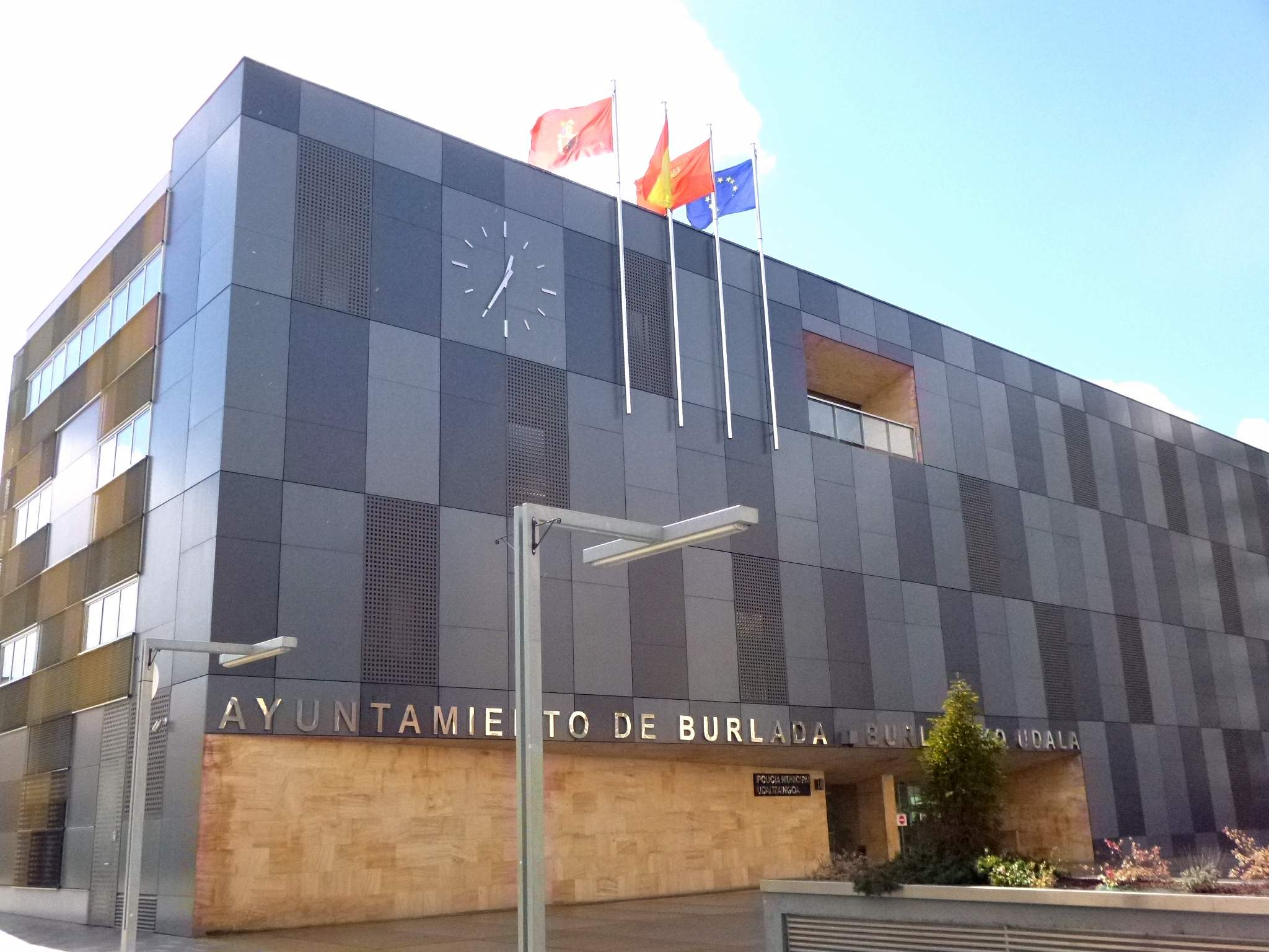 Ayuntamiento de Burlada (Navarra)